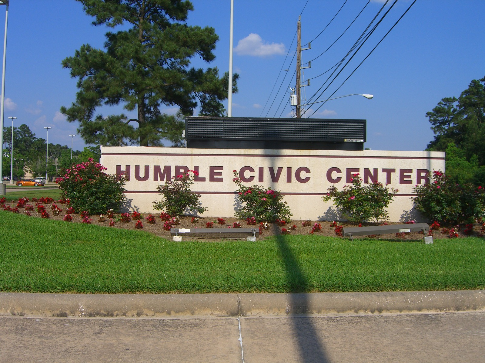 Entrance to Humble Civic Center Arena entrance